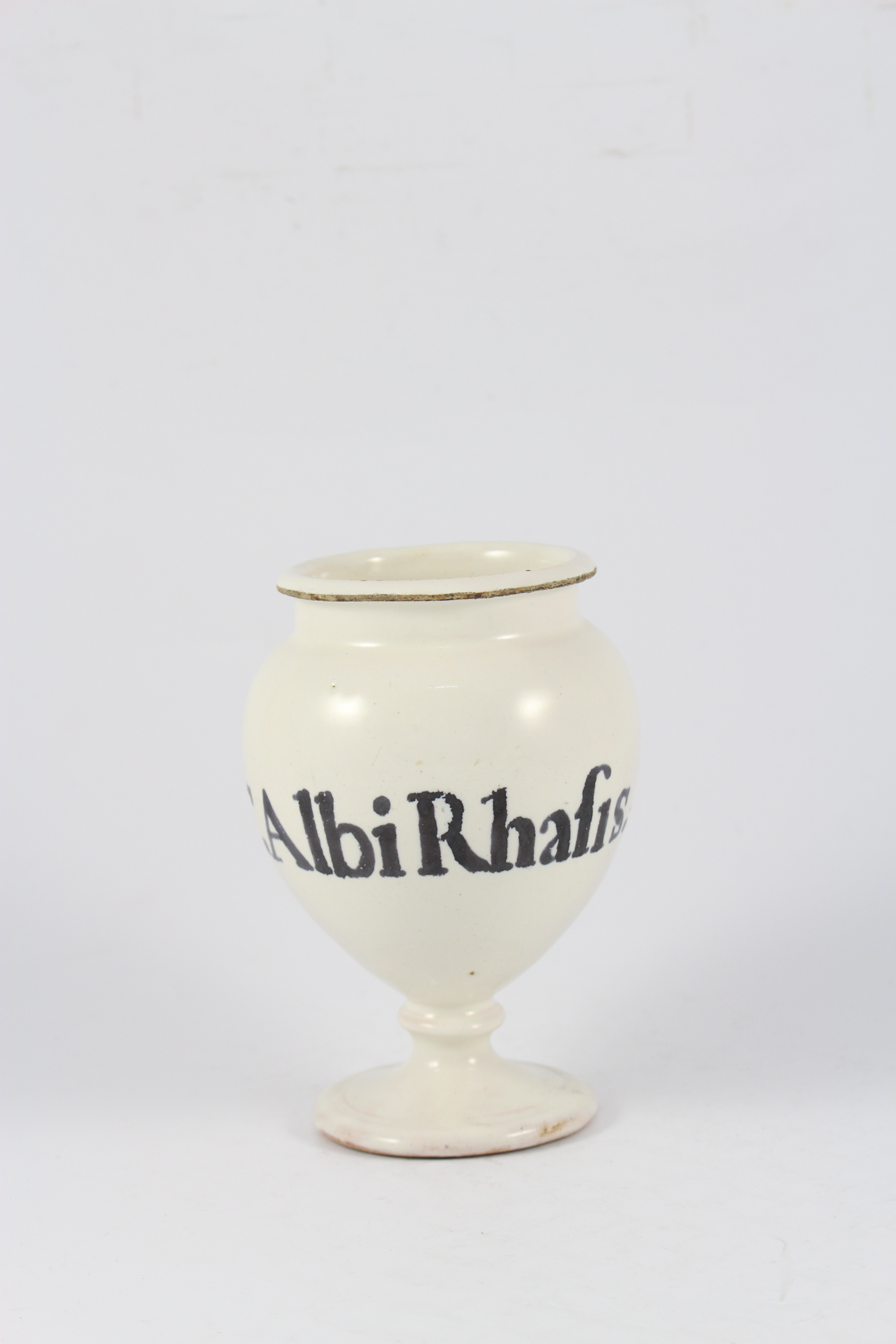 Trochisque albi rhasis (blanc de rhazès) - pilulier